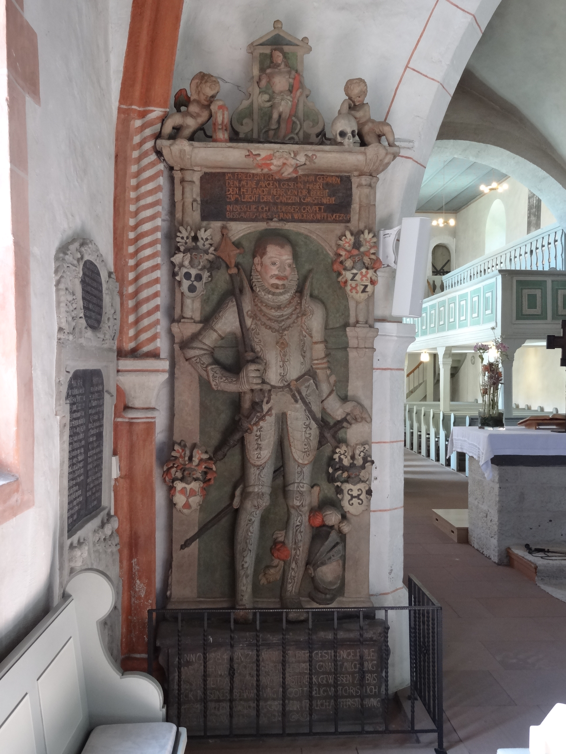 Evangelische Kirche Großen-Buseck